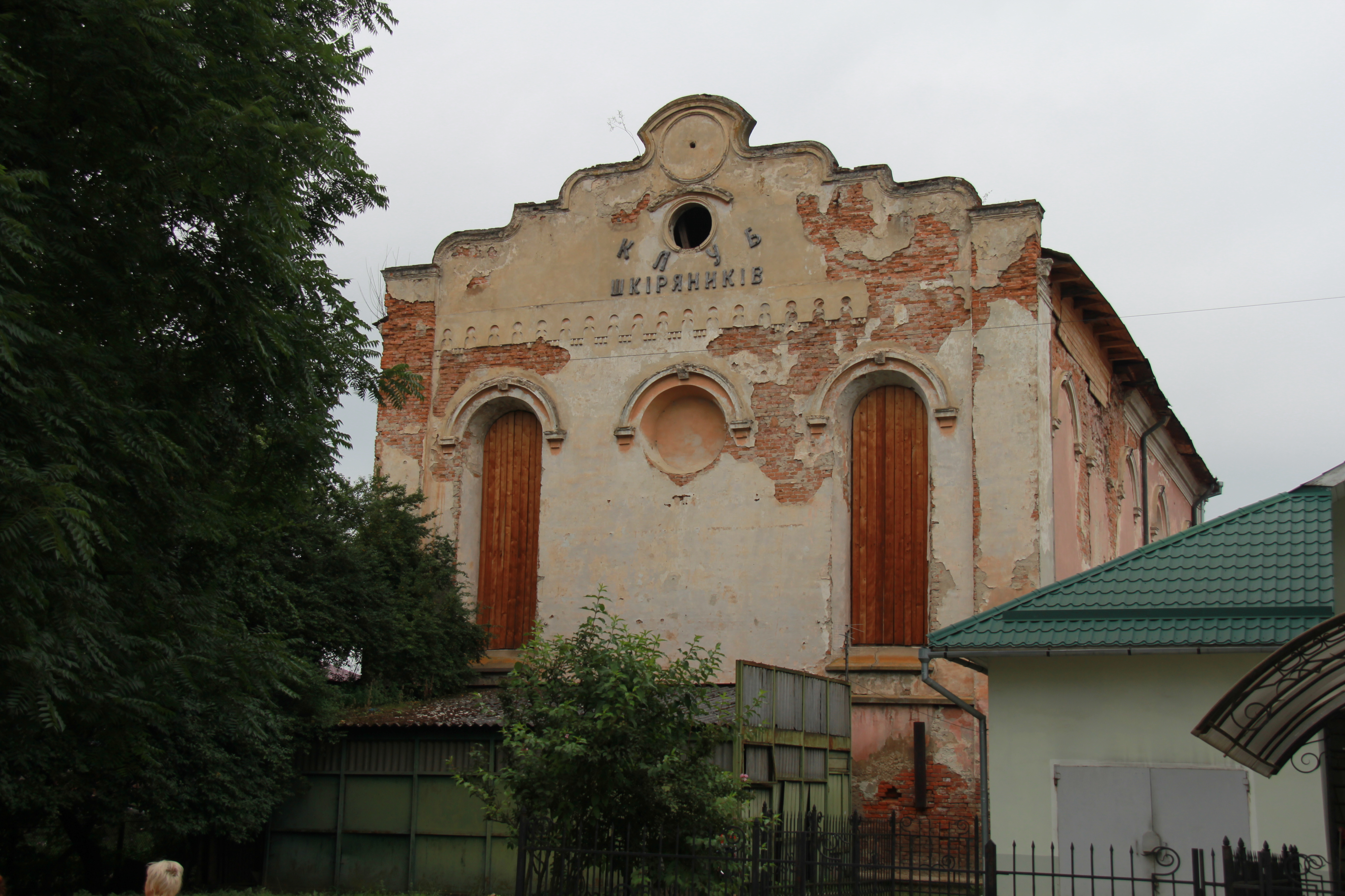 Колишня синагога на ринку Болехова